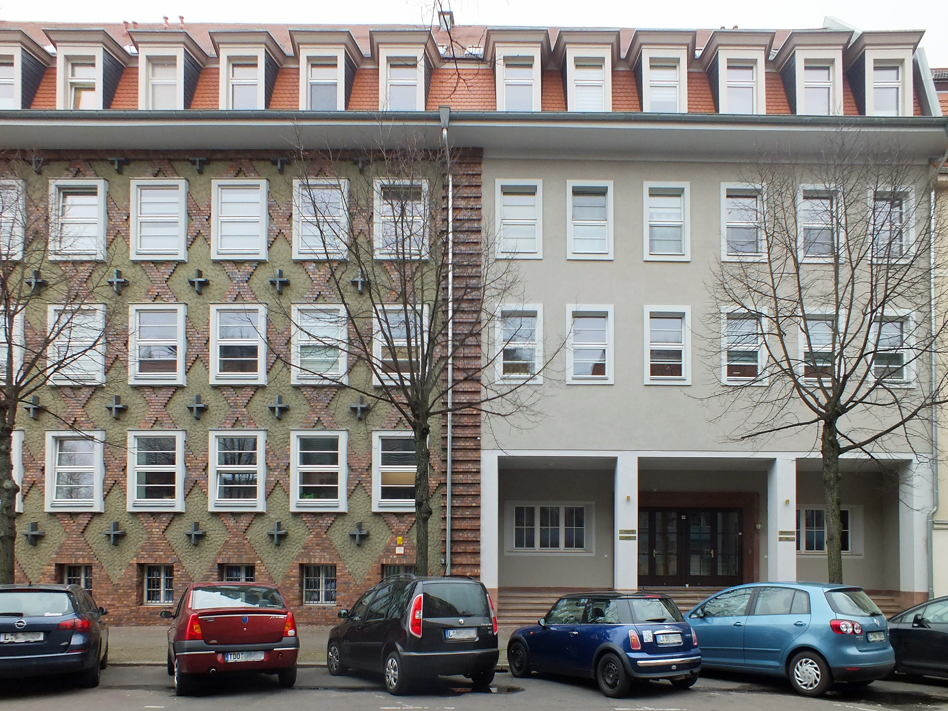 Der 1946 geschaffene Teil des Funkhauses Springerstraße in Leipzig, der Haupteingang